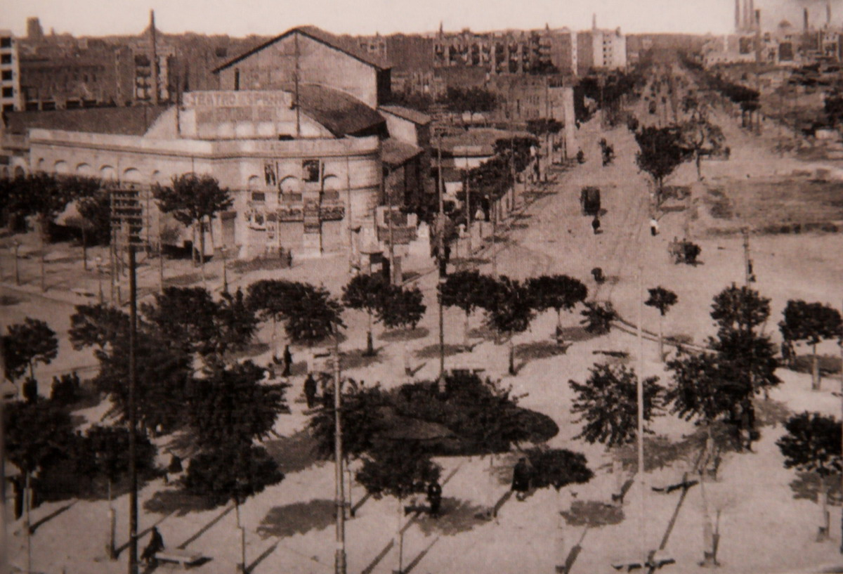 Teatre España (Barcelona-Catalunya), obra de Joaquim Raspall de 1914, estava ubicat a la Gran Via cantonada Paral·lel. Desaparegut